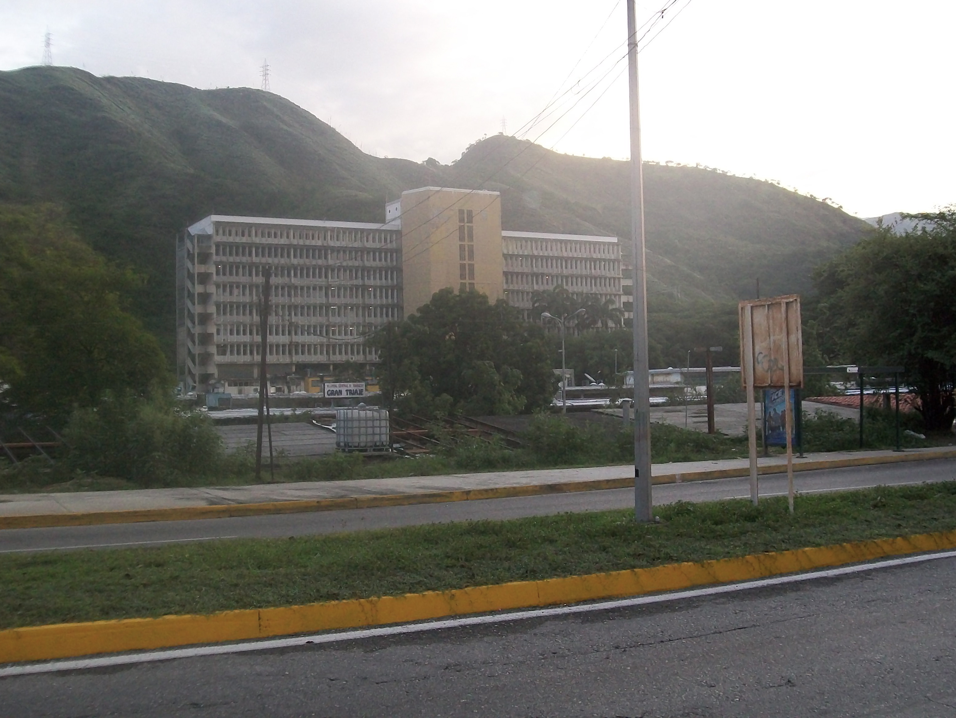 Hospital Central de Maracay, final Avenida Las Ballenas, Maracay.